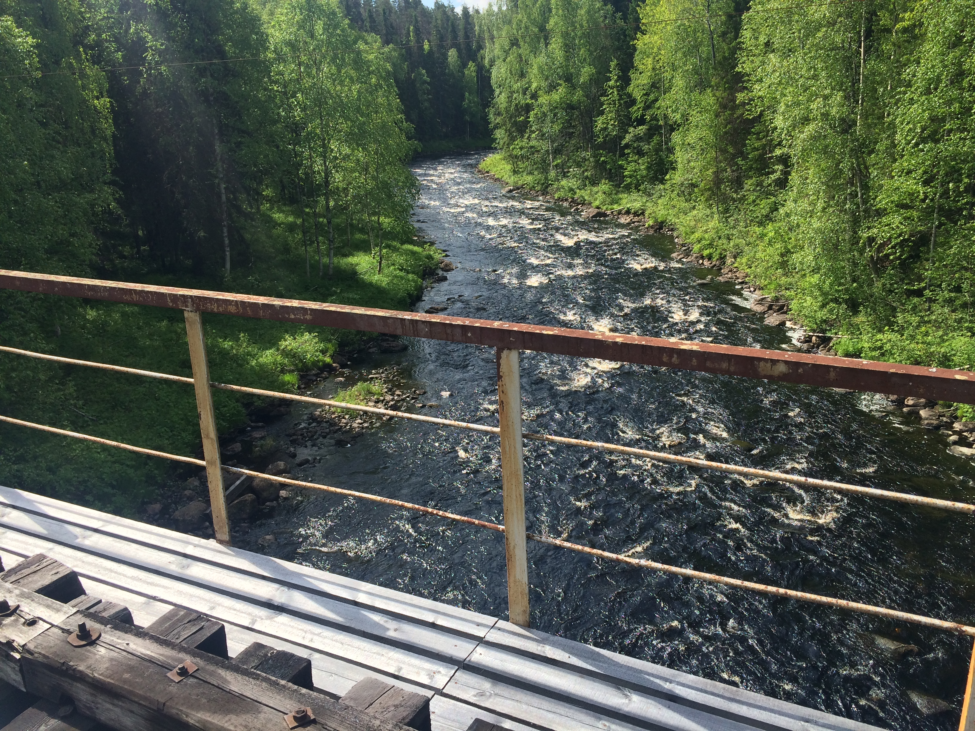 Пюрика. Вид с ЖД моста на юго-запад.